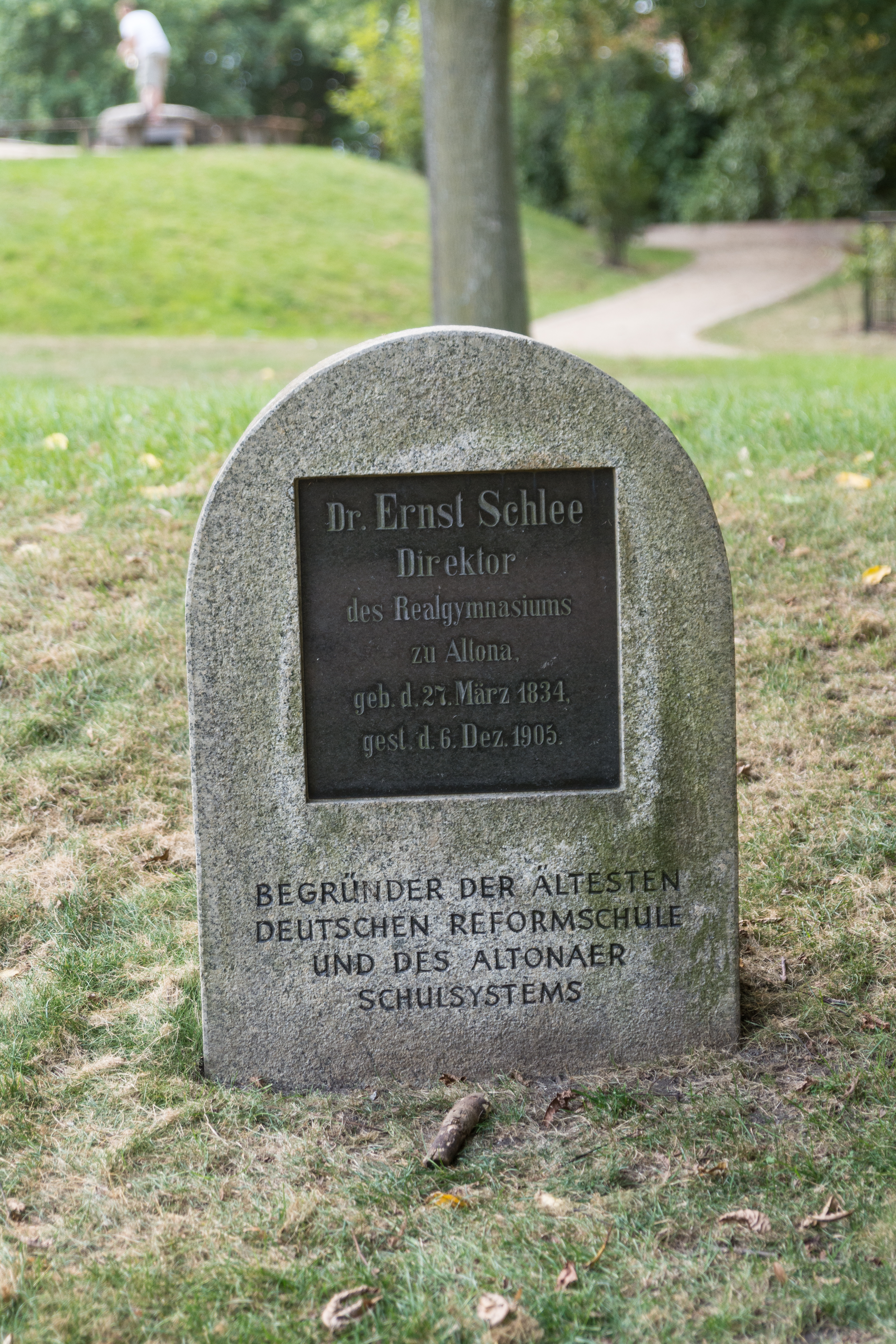 Grabstein für Dr. Ernst Schlee im Schleepark in Hamburg-Altona-Altstadt. This is a photograph of an architectural monument.